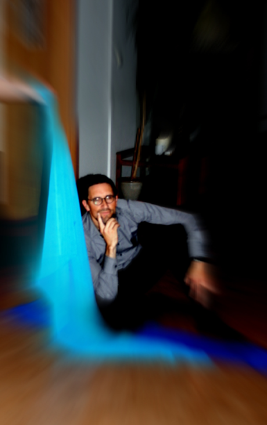 Sagnaspuni í ReykjavíkurAkademíunni